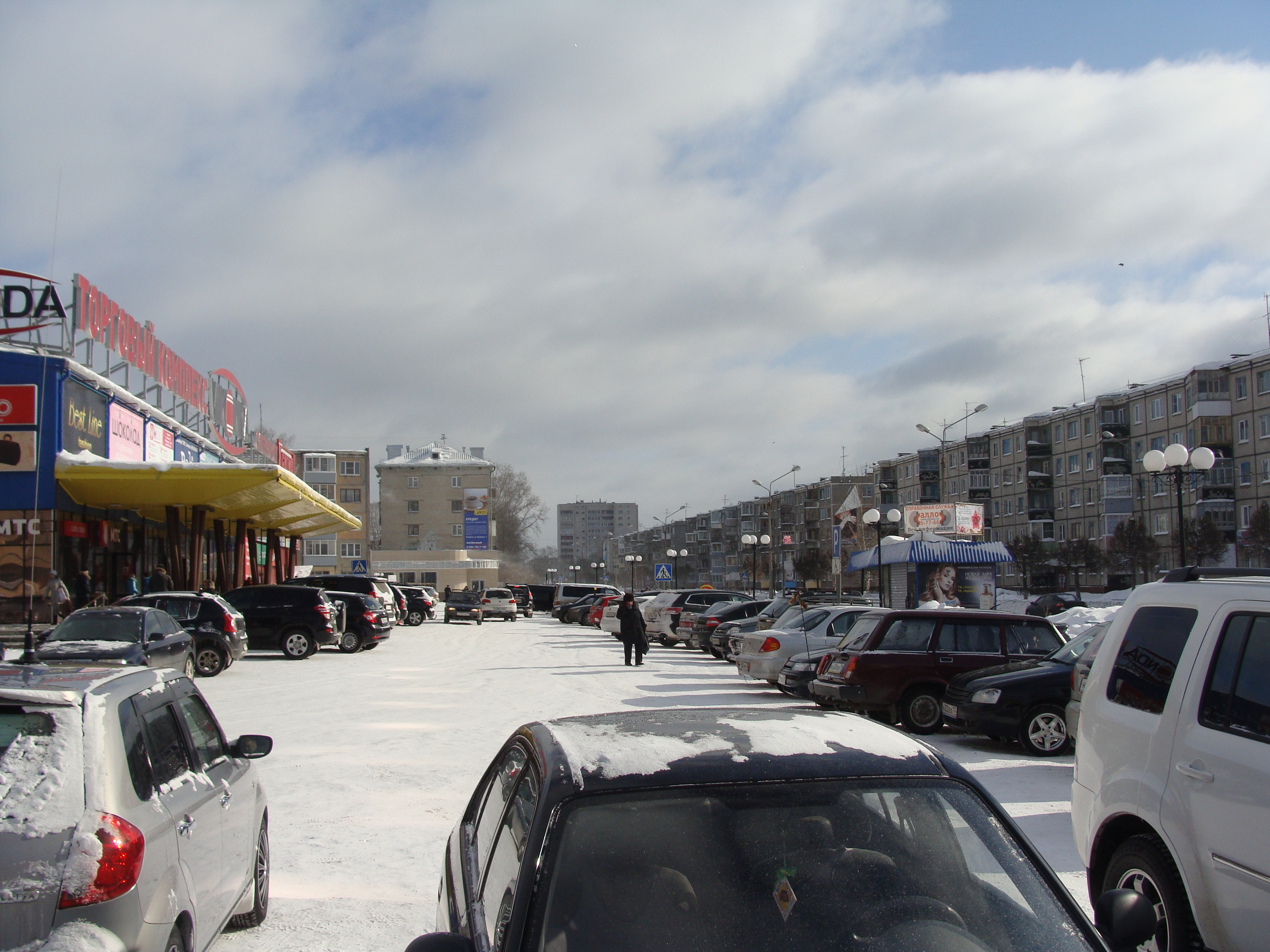 Виконда и ул. Ленина, Коряжма